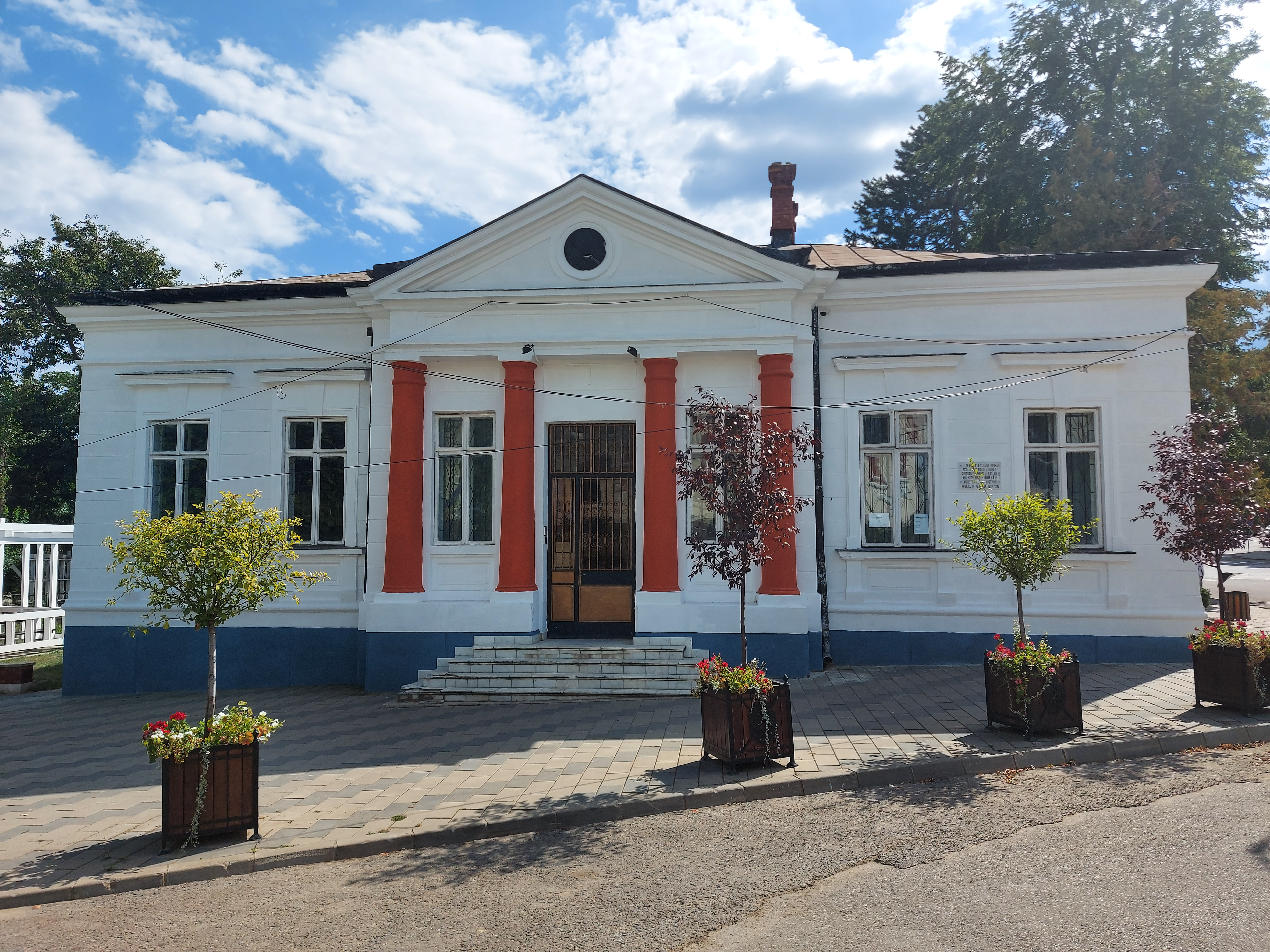 Prima Școală din orașul Dorohoi unde a învățat Spiru Haret în clasele I- II în anii 1859-1860. Ministru al Instrucțiuni Publice 1897-1910.